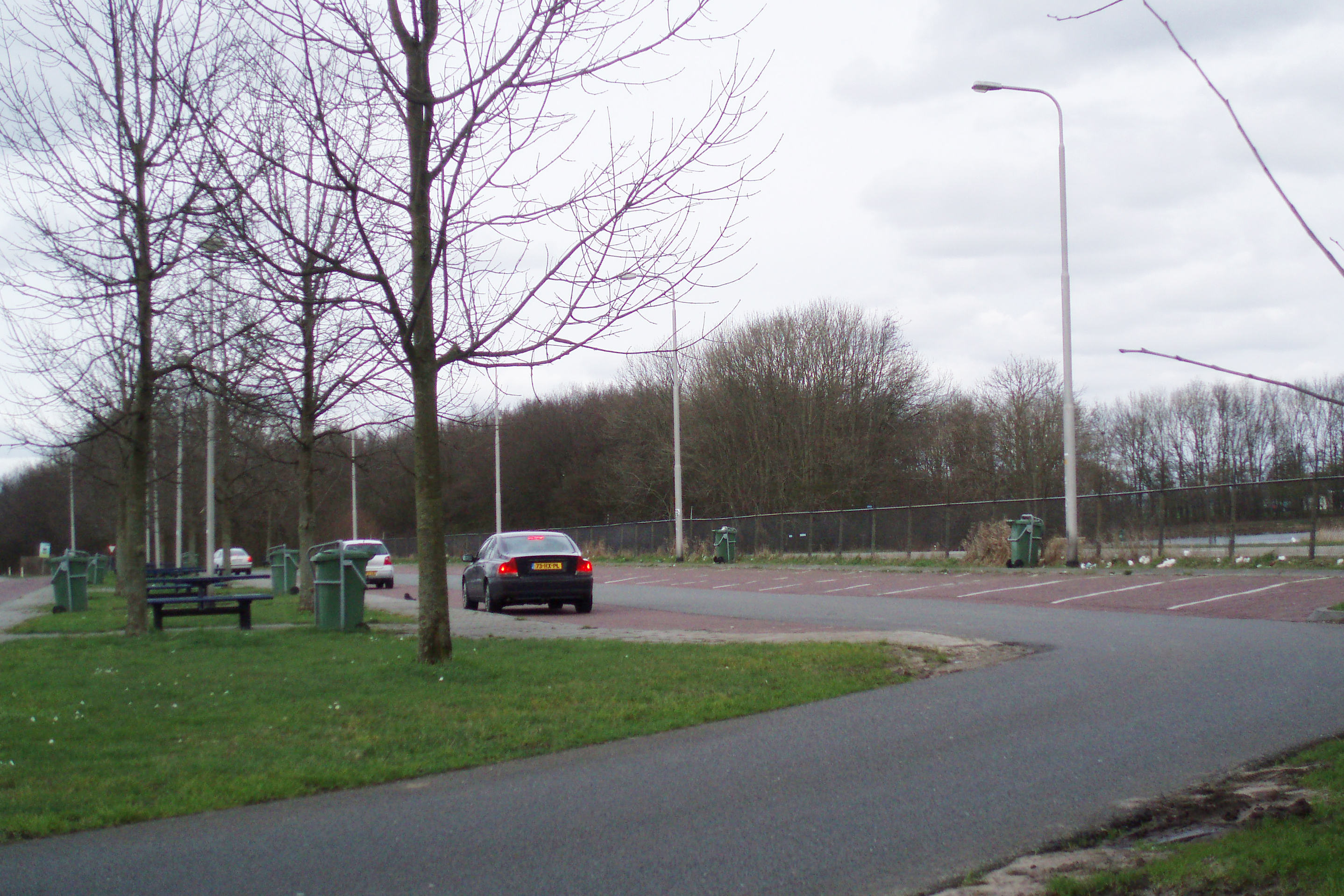 Verzorgingsplaats De Markte aan de A28.